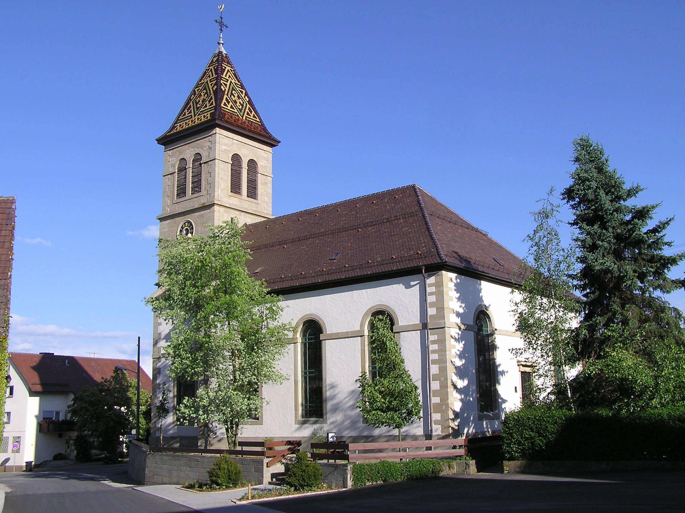 Michaelskirche Unterjettingen, selbst fotografiert, GNU FDL